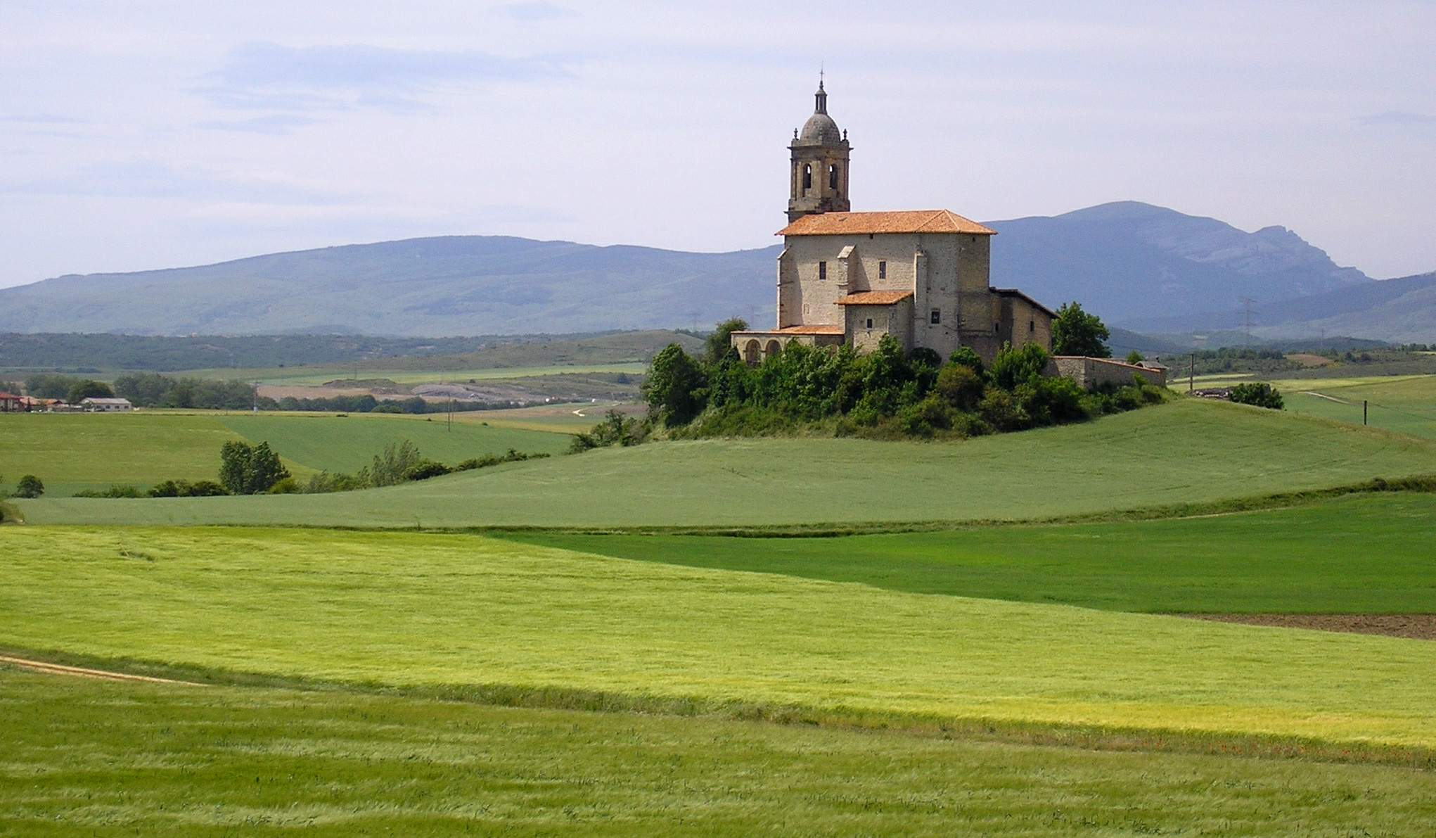 Paisaje de la Llanada Alavesa: iglesia de Arroiabe, y al fondo, el monte Gorbea